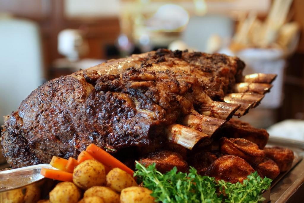 Côtes rôties de boeuf Angus